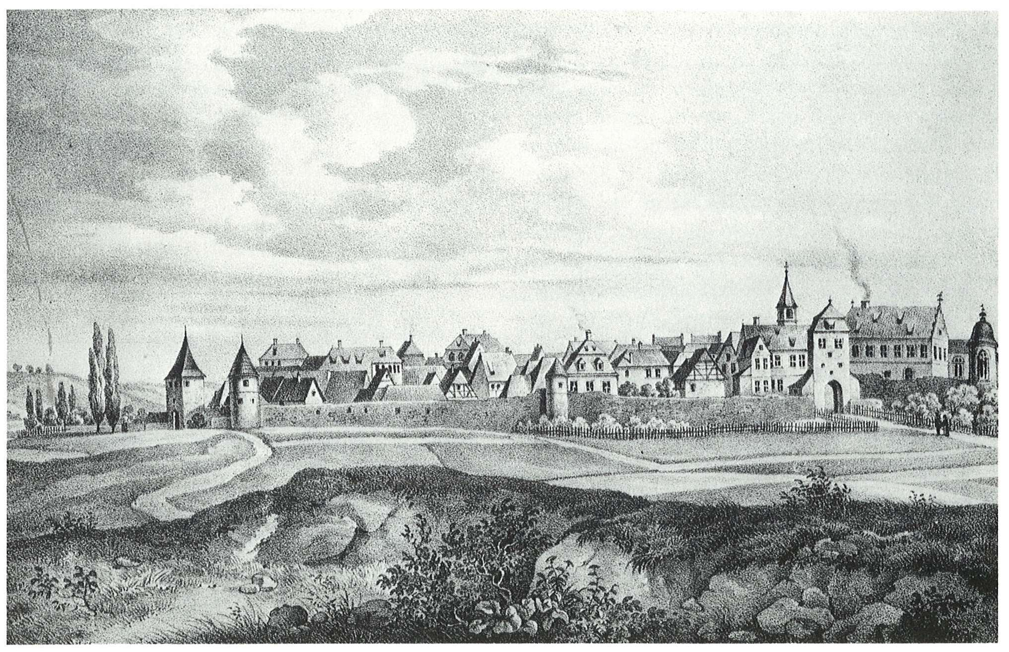 Lithographie Sommerach, Anton Schleich um 1850, urspr. Beschreibung: "A. Schleich lith.", "SOMMERACH AM MAIN", 19,3 x 11,9 cm heute im Museum für Franken, Würzburg